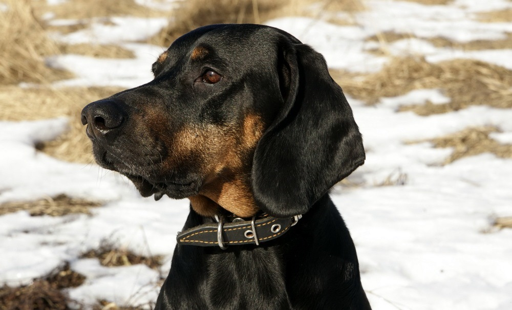 голова польской гончей